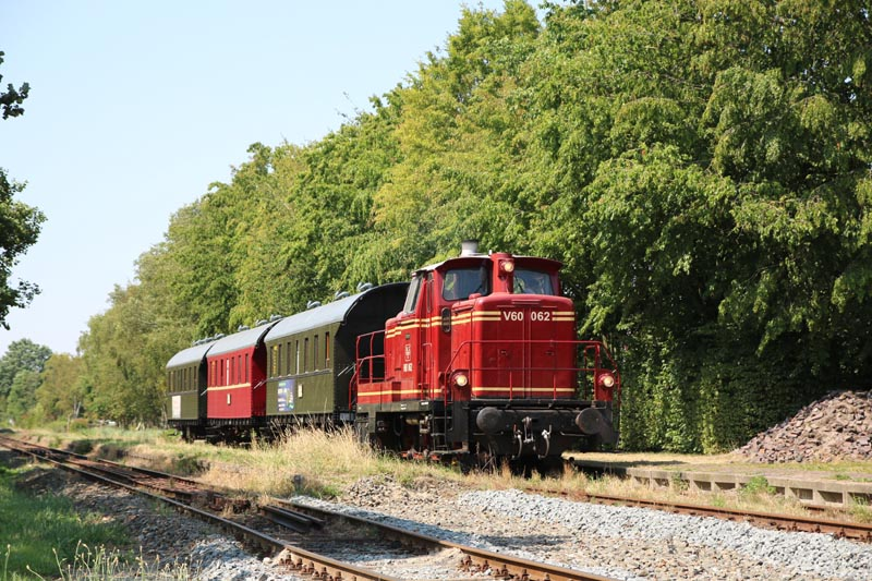 Belgische V60 062 vor drei Donnerbüchsen in Dornum